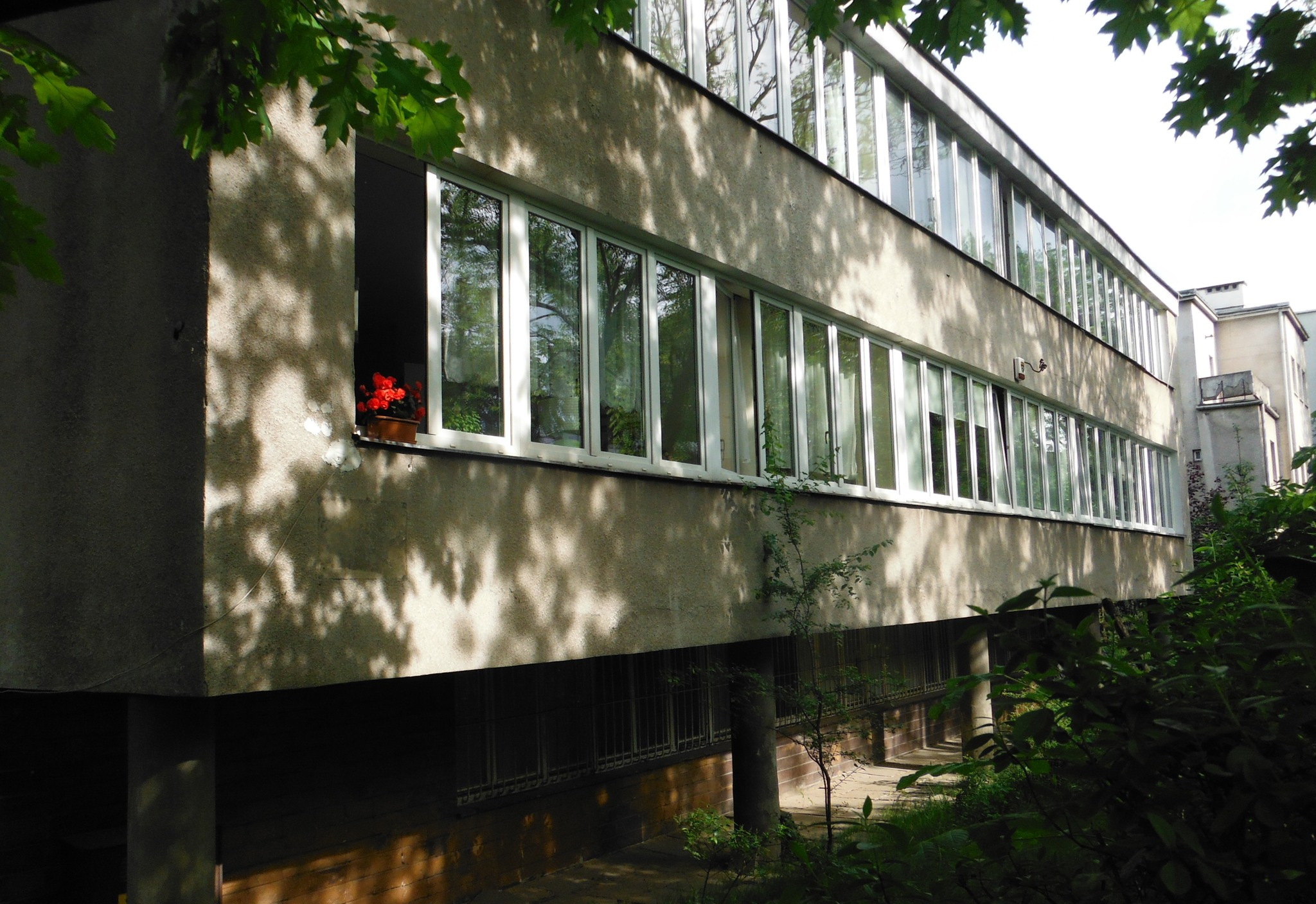 Dom Krzymuskich (ul. Walecznych 12 w Warszawie), zaprojektowany przez Helenę i Szymona Syrkusów, 1935-1937.